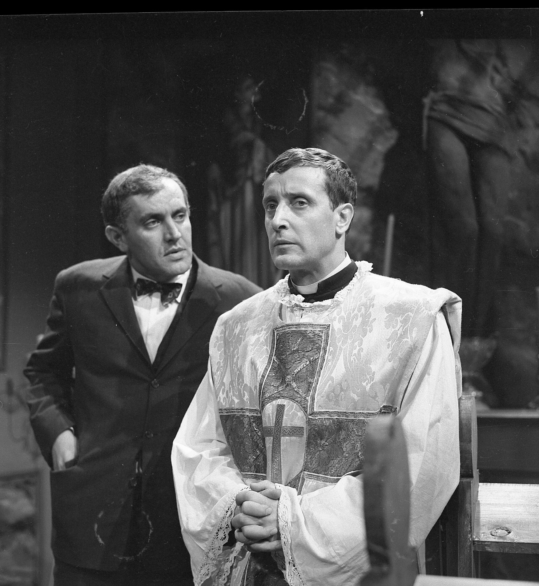 Ljuba Tadić i Stevo Žigon, tv drama.Foto:Stevan Kragujević (po odobrenju kćerke Tanje Kragujević)